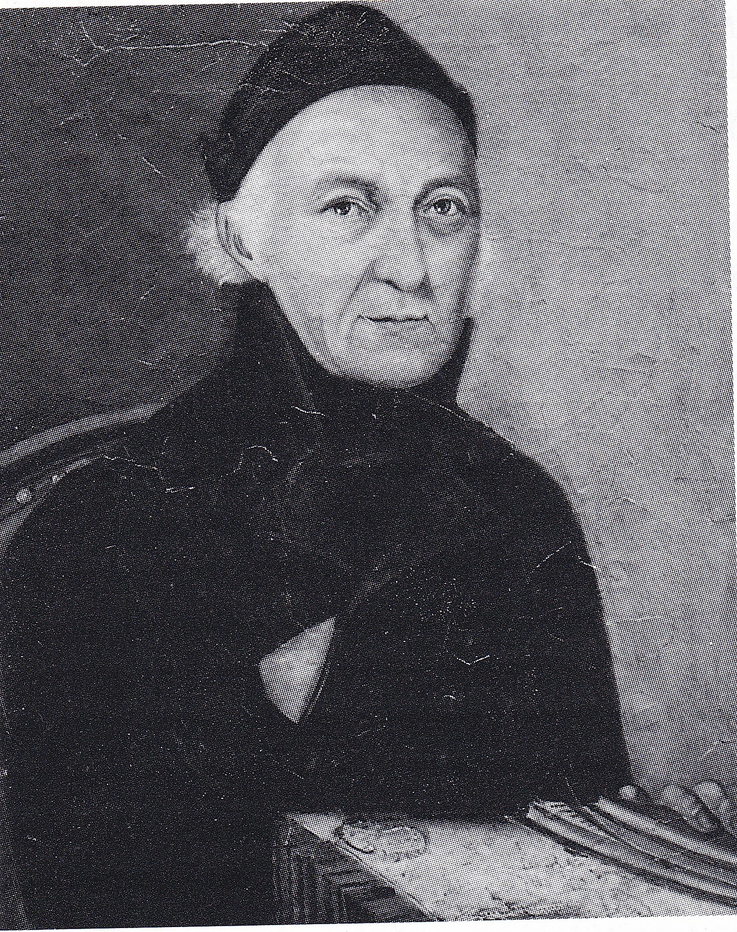 Werk eines unbekannten Künstlers von Albin Schwaiger, der Augustiner-Chorherr, Meterologe und Seelsorger in Oberammergau war. Das Werk ist eine Dauerleihgabe der Kirchenstiftung Böbing am Meteorologischen Observatorium Hohenpeißenberg.